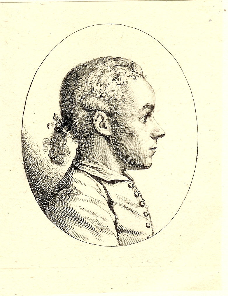 Physiognomisches Porträt des etwa 10 jährigen Peter im Baumgarten; aufgrund der Signaturreste Georg Friedrich Schmoll zuzuschreiben.